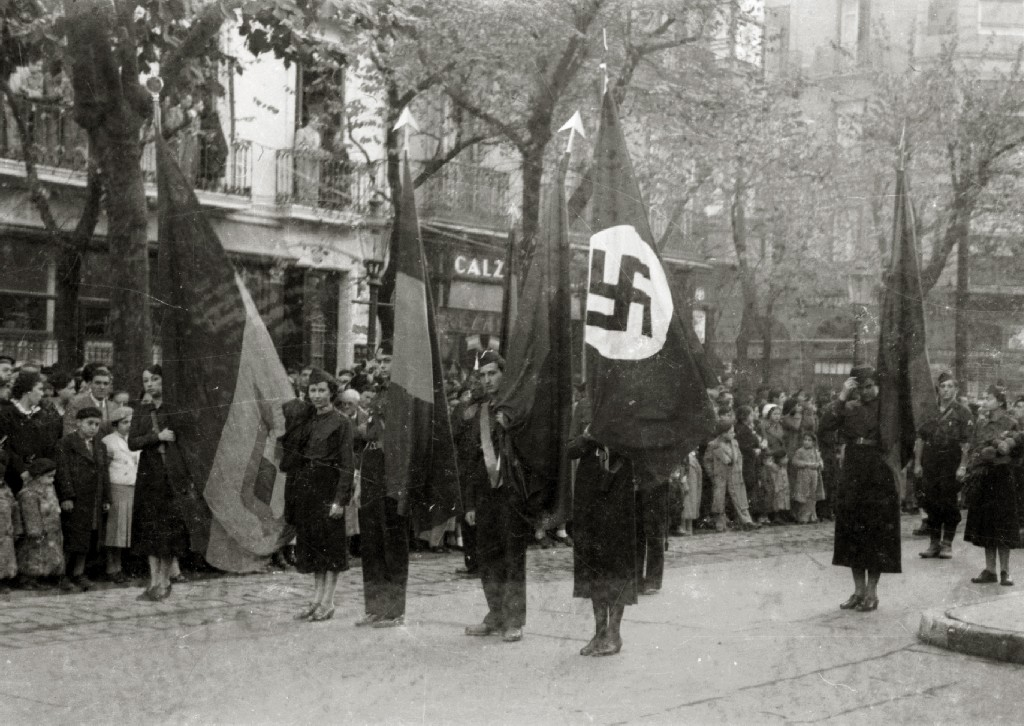 Título original: Entrada de las tropas nacionales en San Sebastián (48/54) Localización: San Sebastián (Guipúzcoa)